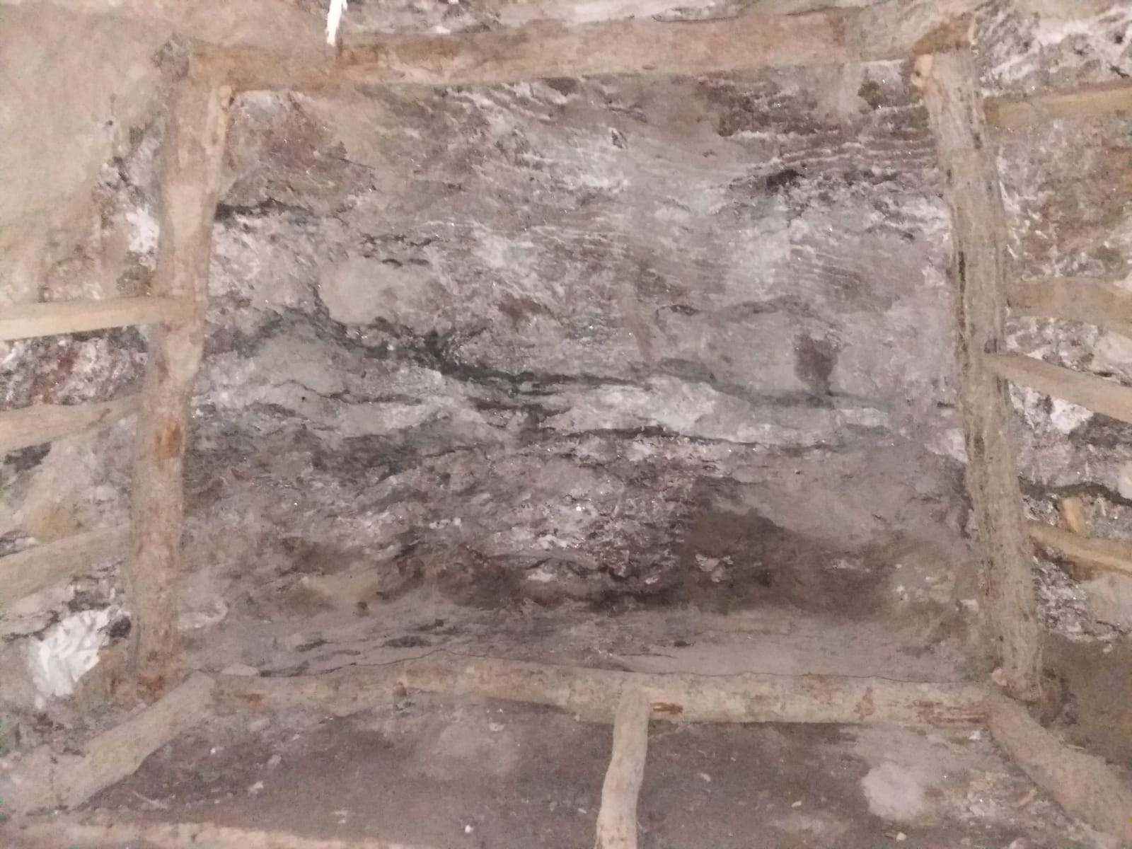 Очишћено у подграђено радилиште у јами Побрђе, где се врши експлоатација борних минерала.